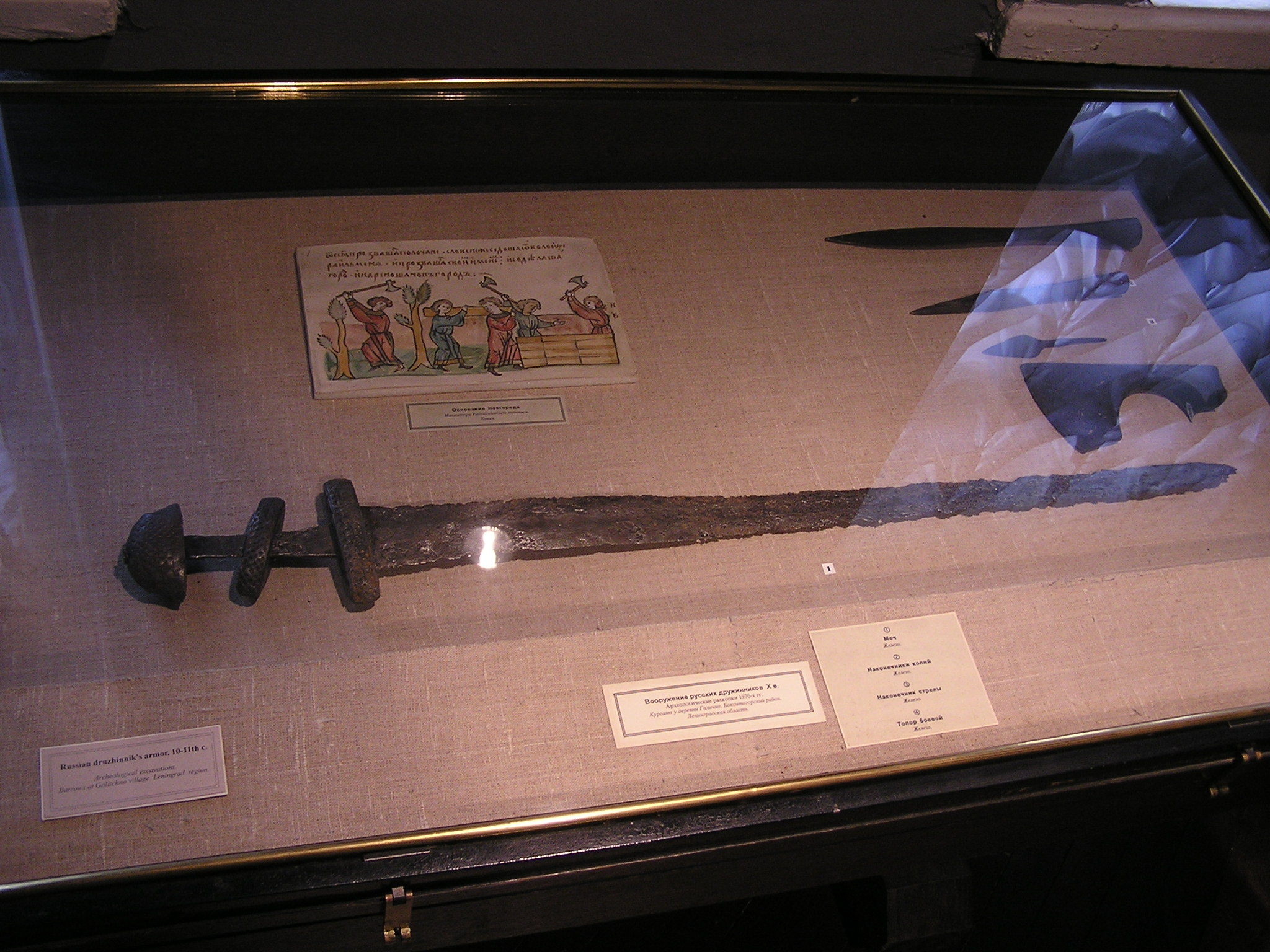 Санкт-Петербург. Петропавловская крепость. Комендантский дом. Государственный музей истории Санкт-Петербурга. "Петербург - Петроград. 1703-1918 гг." Меч дружинника X века